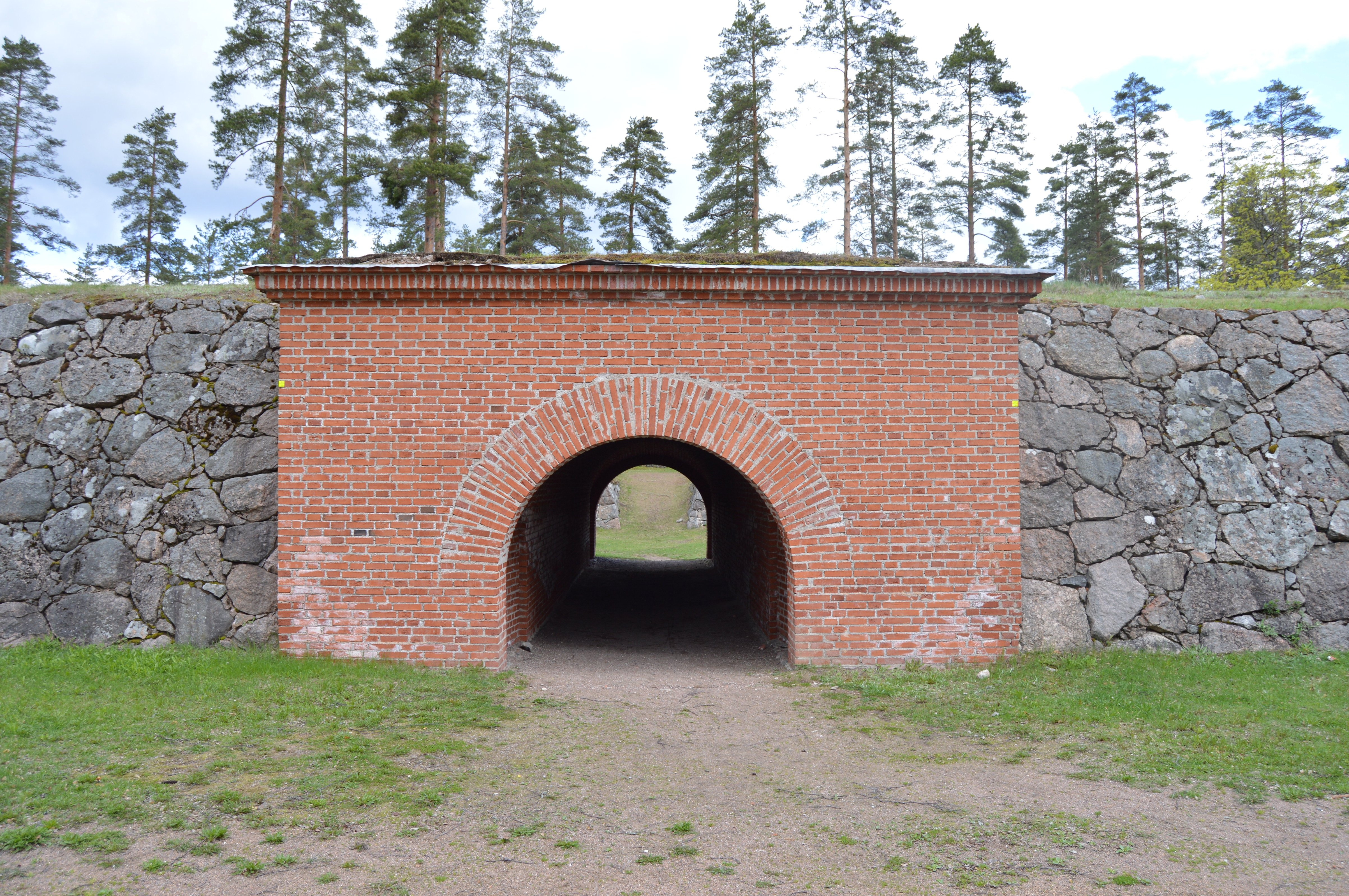 Taavetin linnoitus Luumäellä